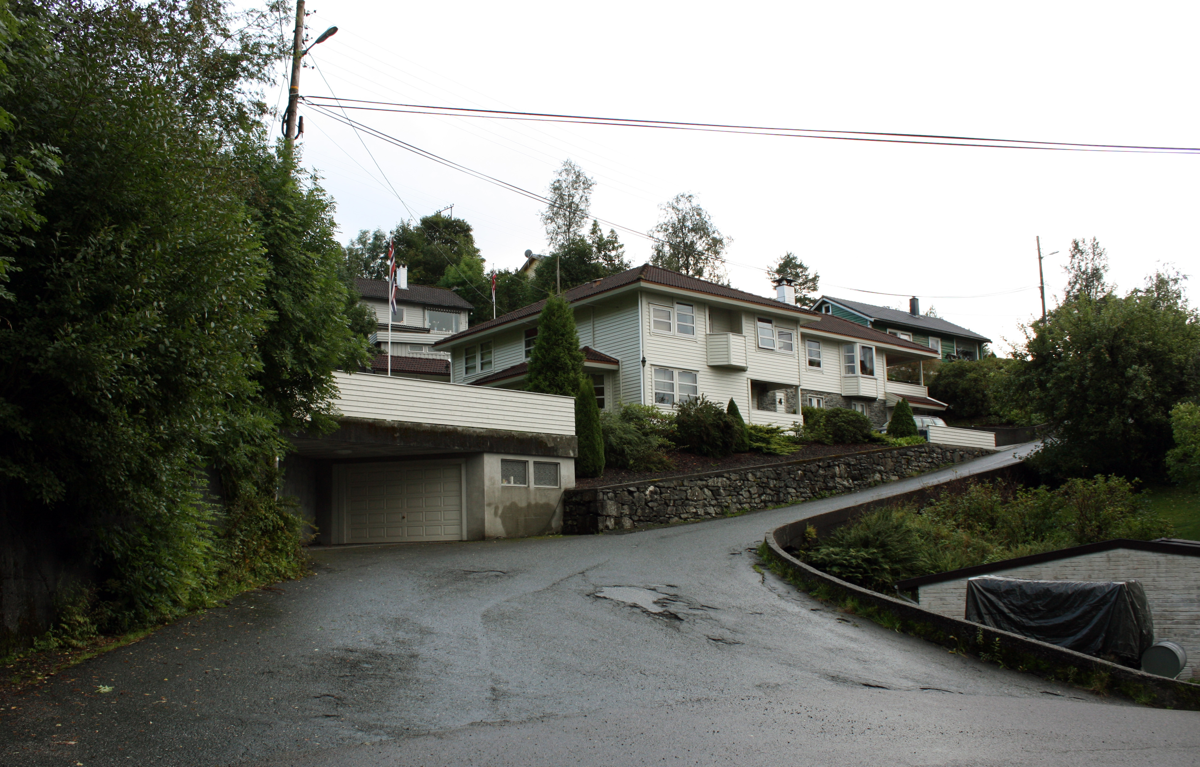 Smørås, Fana, Bergen.